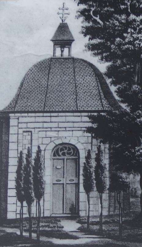 Kaple Nejsvětější Trojice v Mikulášovicích na historické kresbě